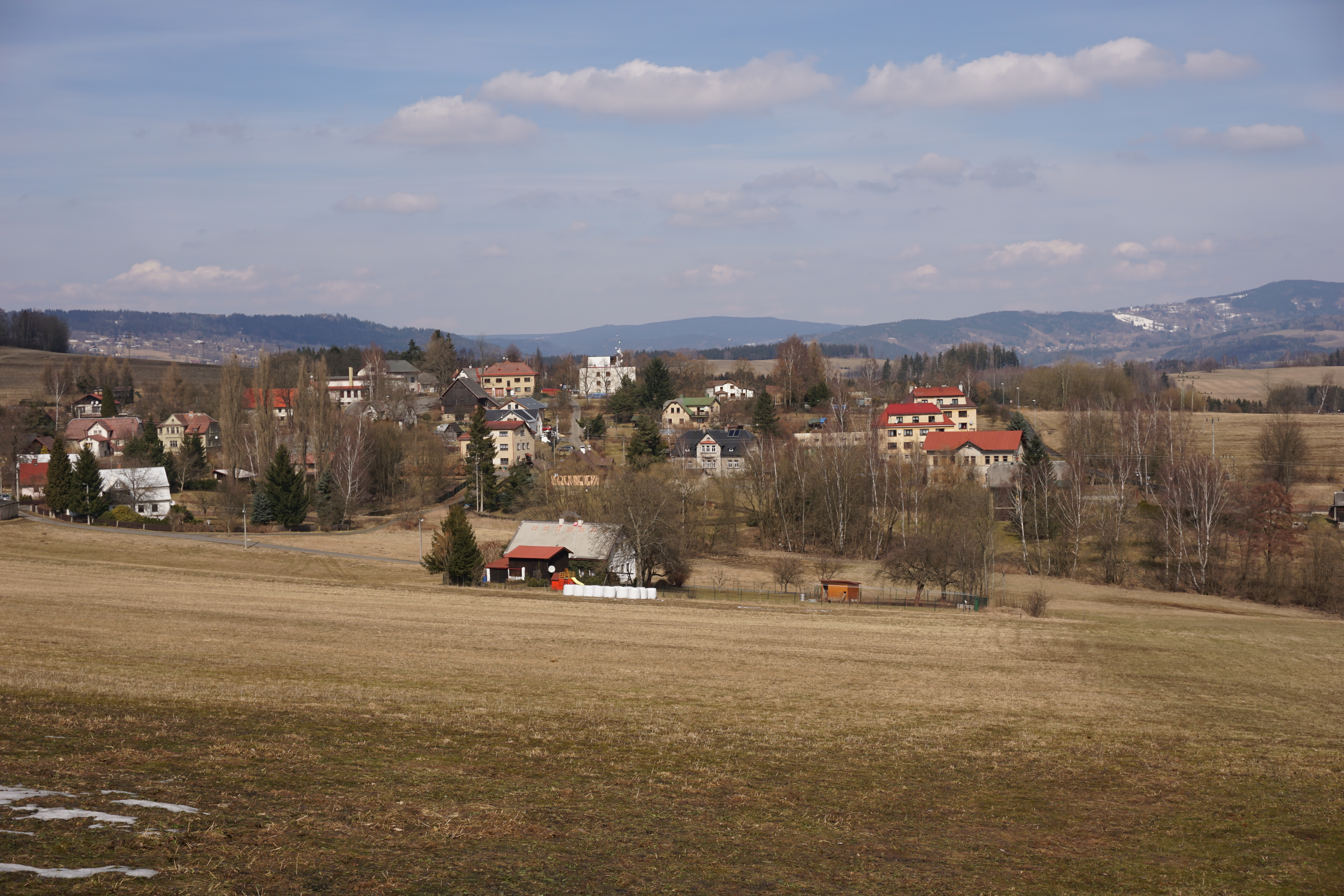 Jílové u Držkova - celkový pohled na západní a střední část vsi od jihu, ze silnice od Jirkova